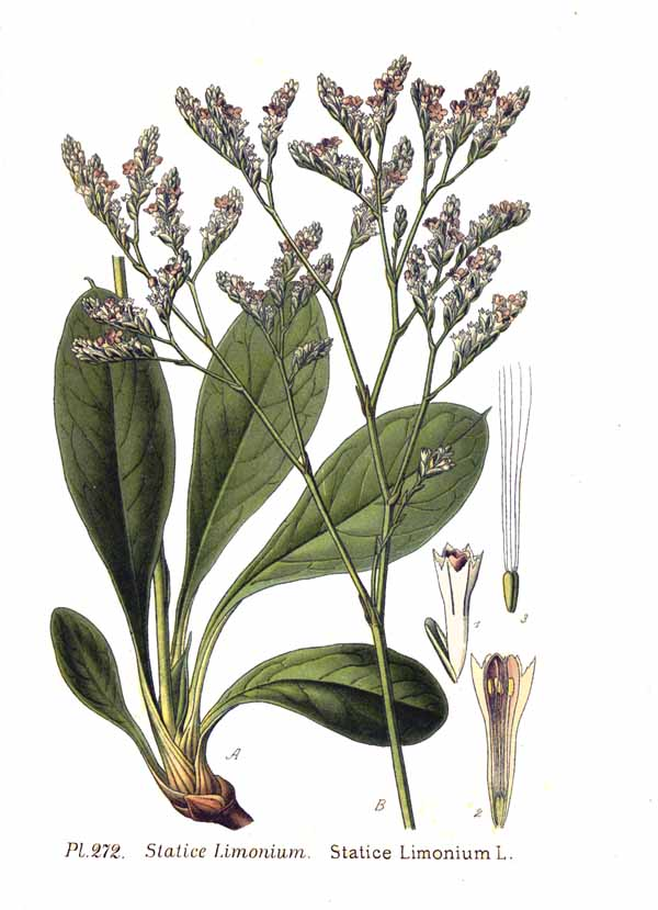 Limonium vulgare Mill., syn. Statice limonium L.